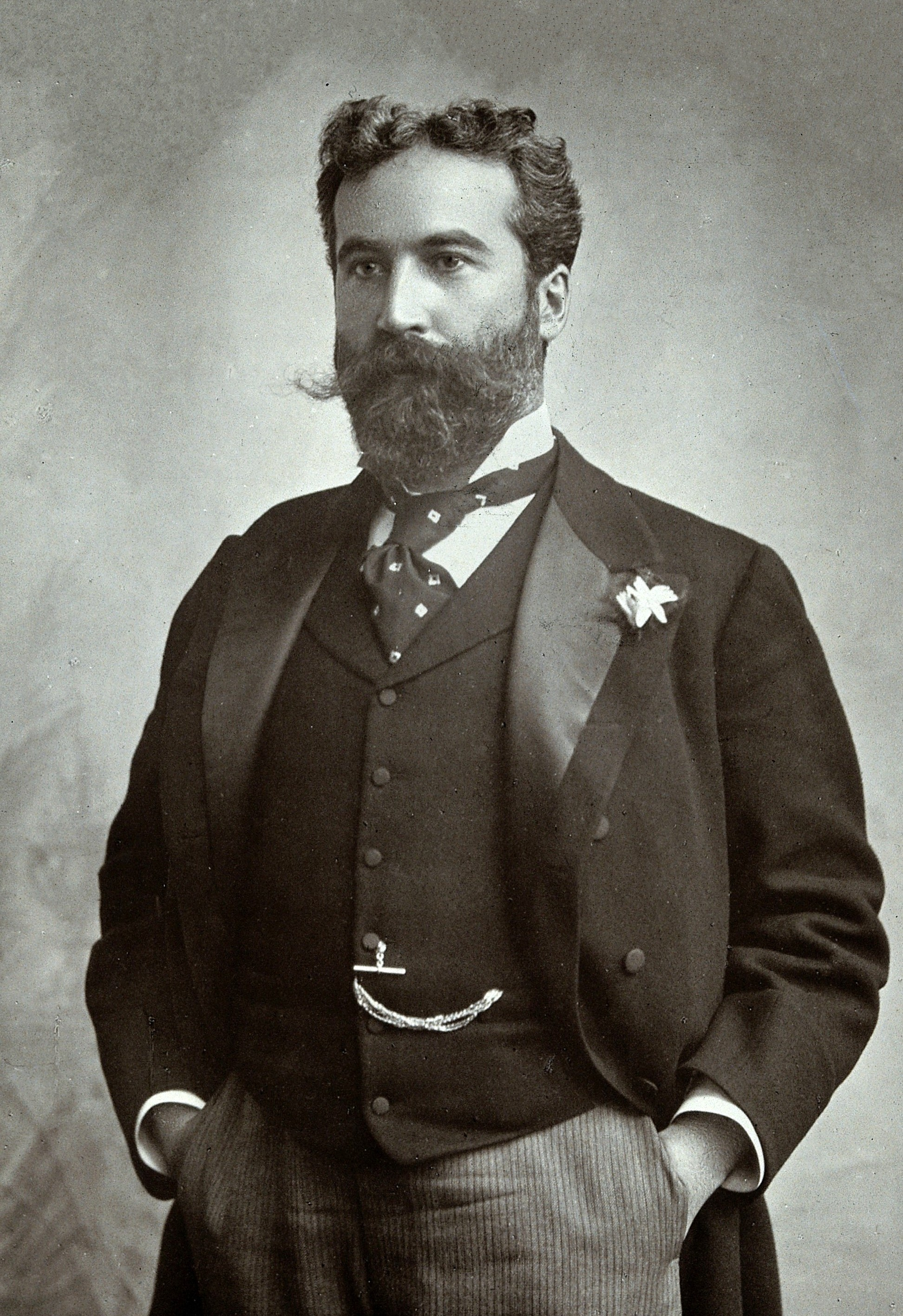 Sir Donald MacAlister